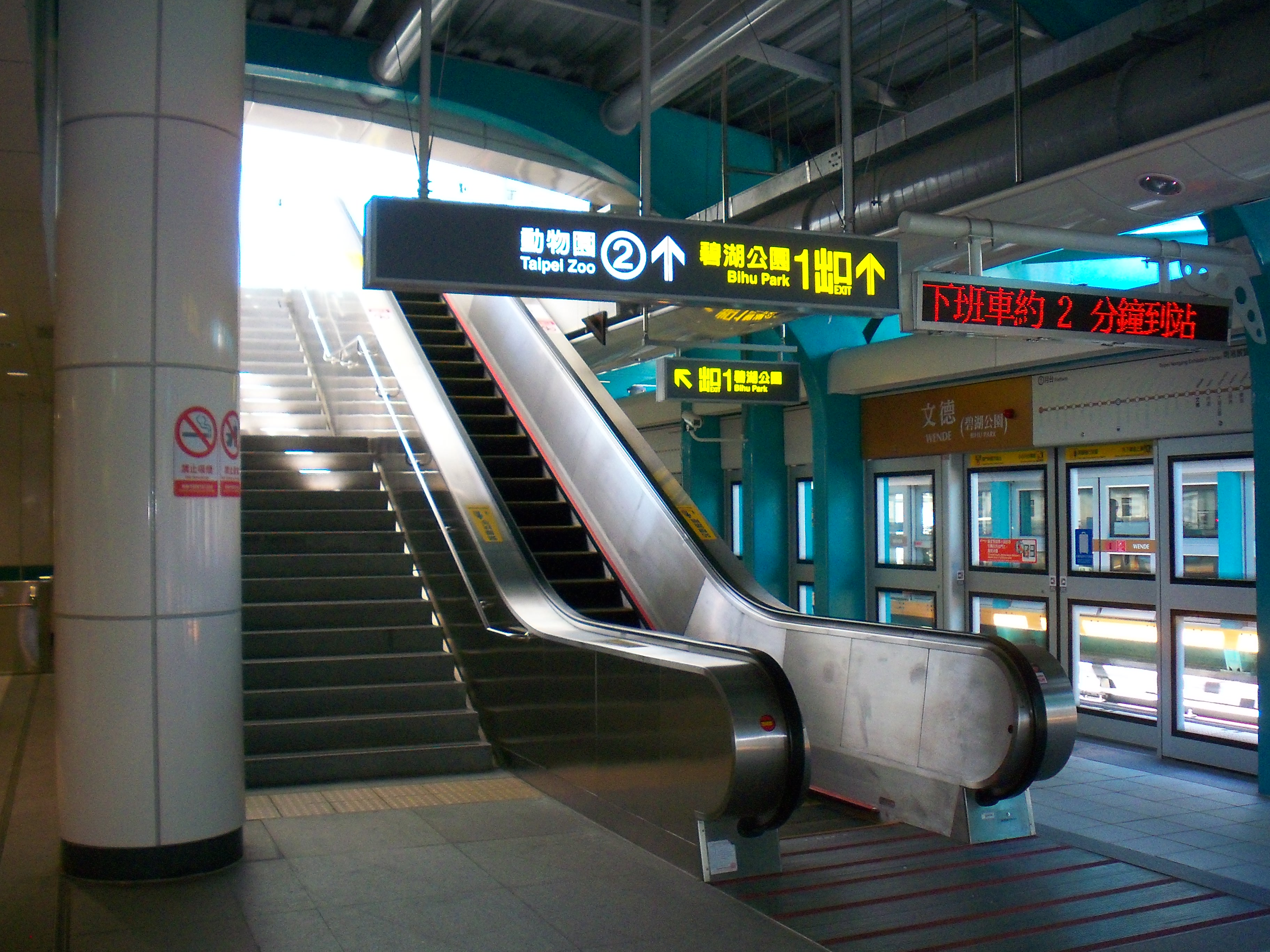 台北捷運内湖線文徳駅の跨線橋。